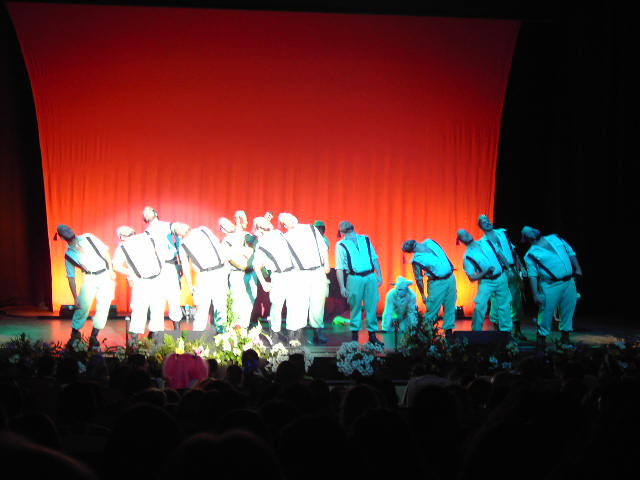 Murga actuando en el teatro del carnaval de Isla Cristina